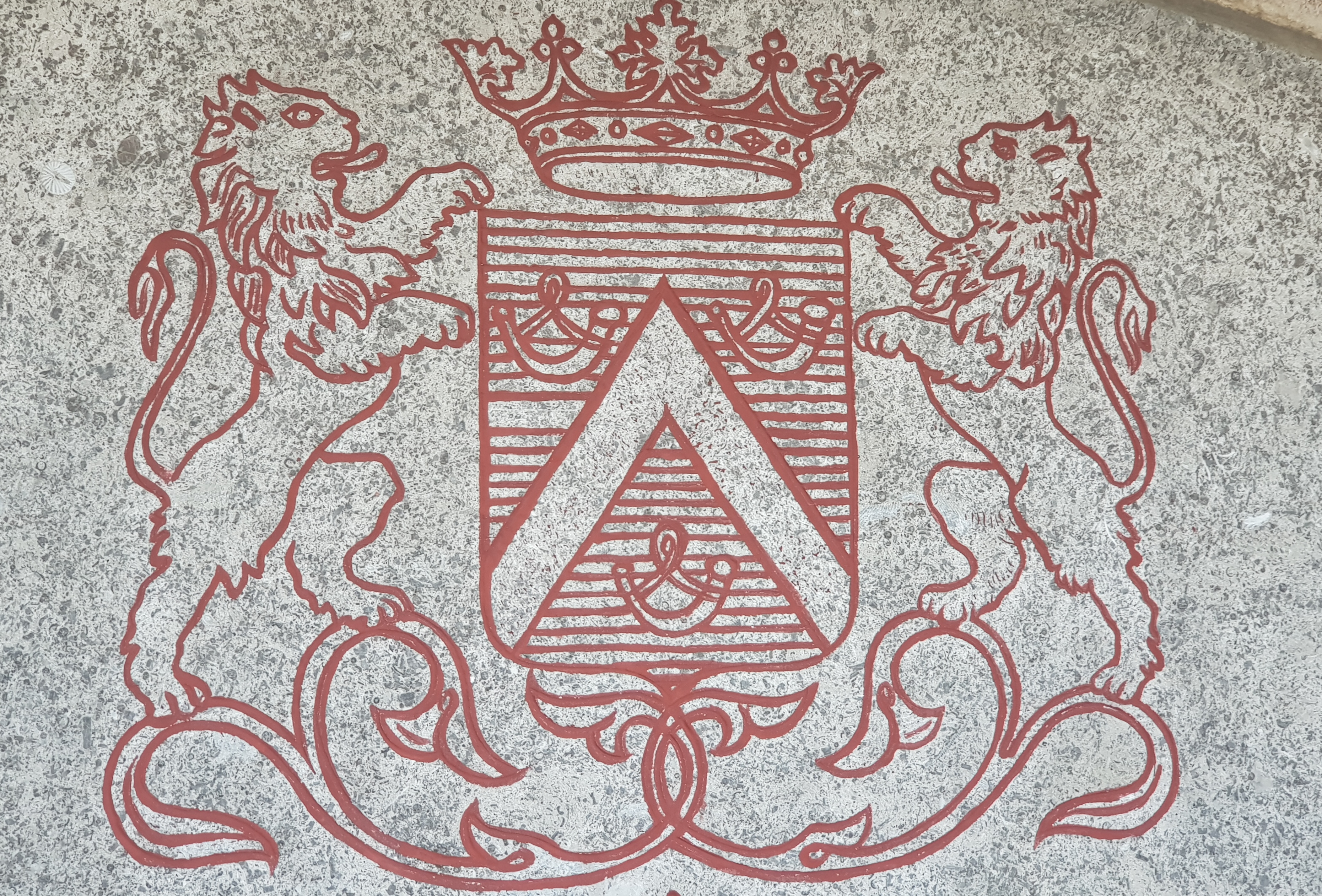 blason